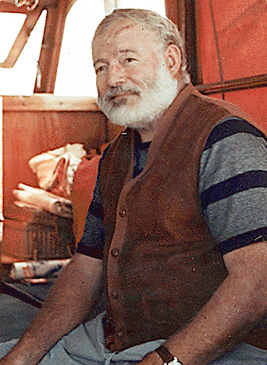 Den Ernest Hemiingway op senger Yacht 1950